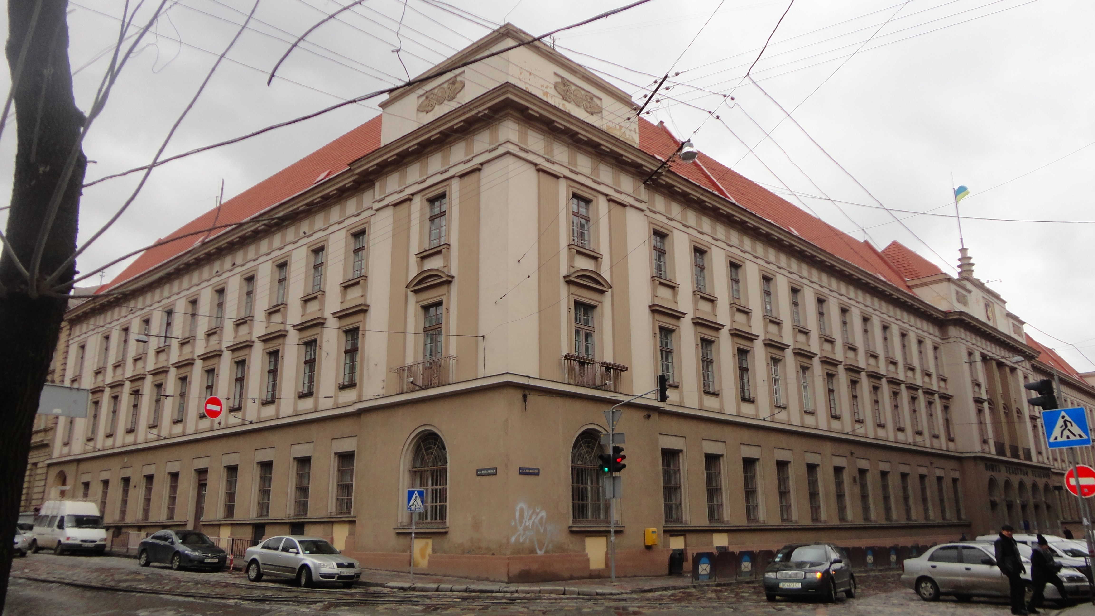 Львів. Головна пошта (1887–1889, архітектори Франц Зетц, Сильвестр Гавришкевич).